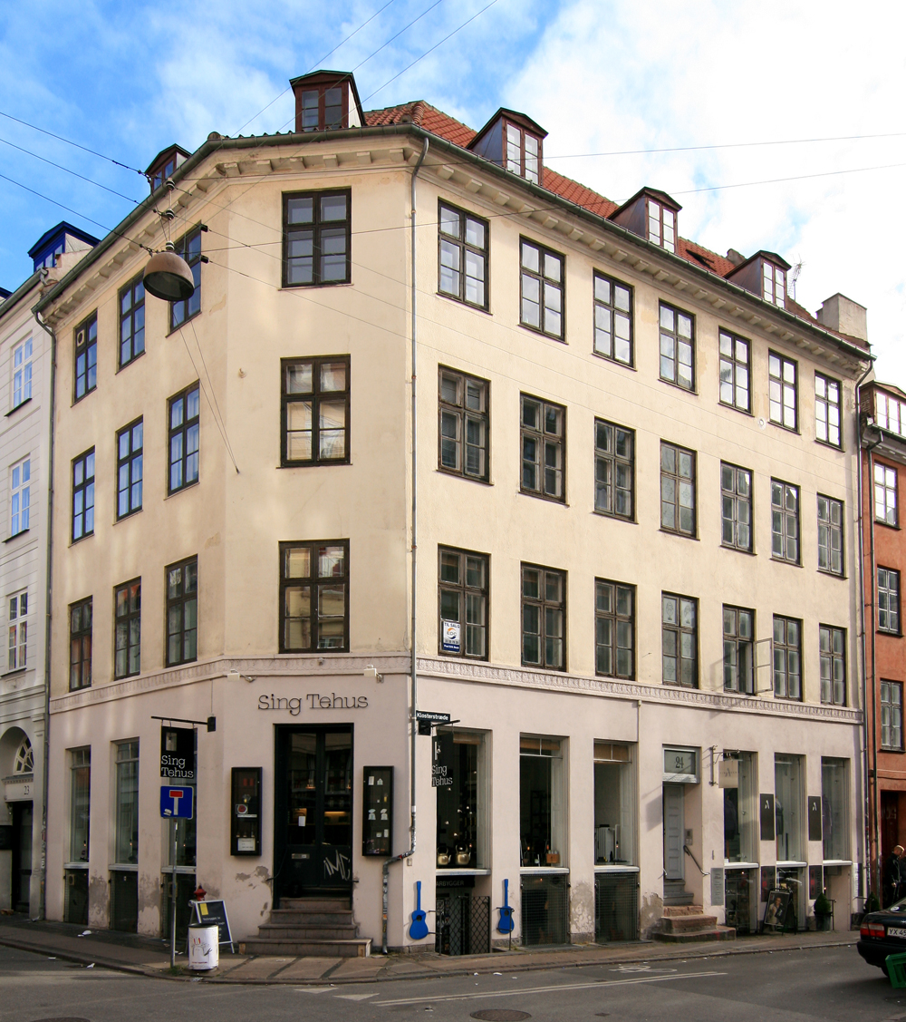 Klosterstræde 24, København. Bygget 1821. Fredet.